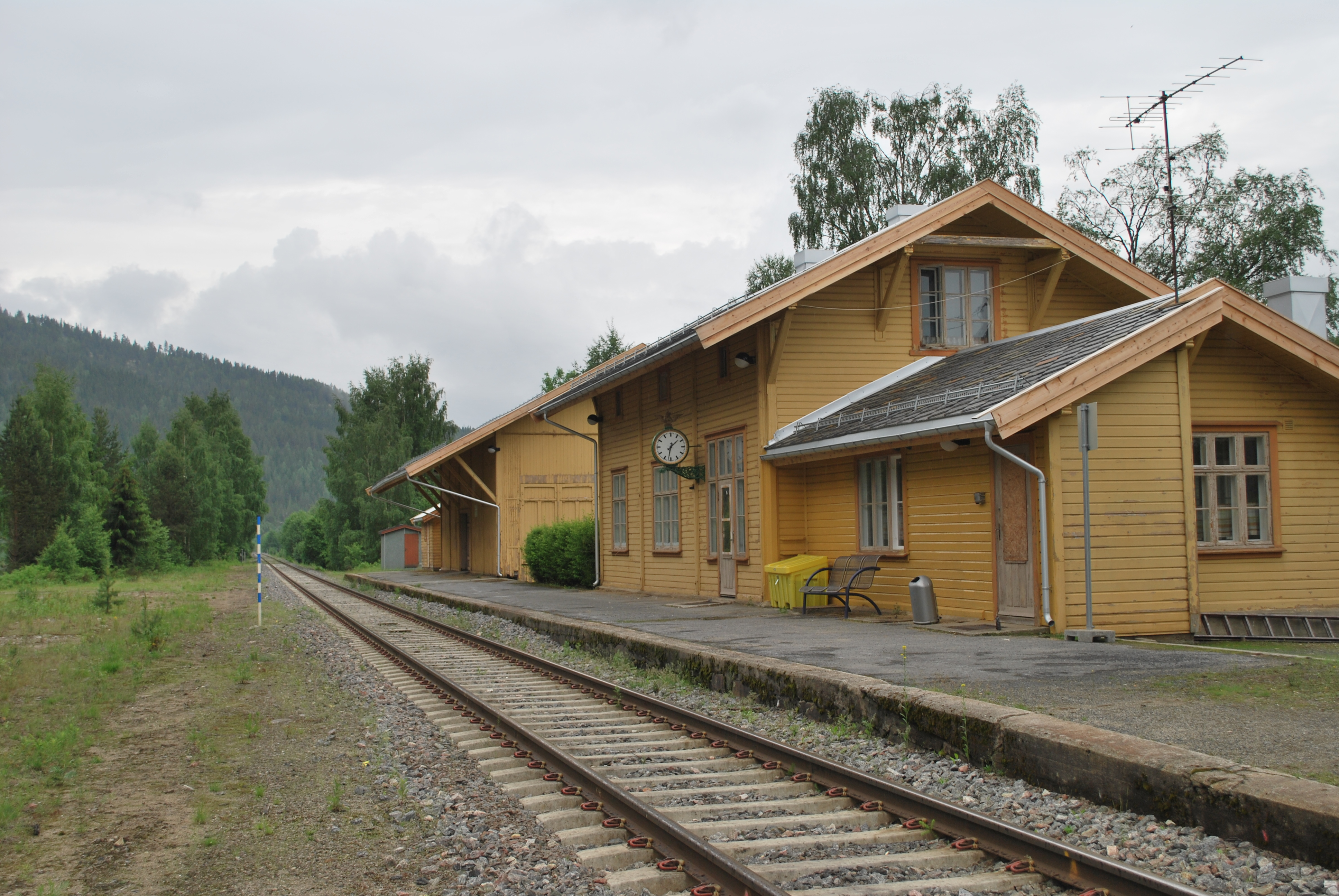 Stai stasjon på Rørosbanen ved Stai i Stor-Elvdal kommune i Hedmark fylke.